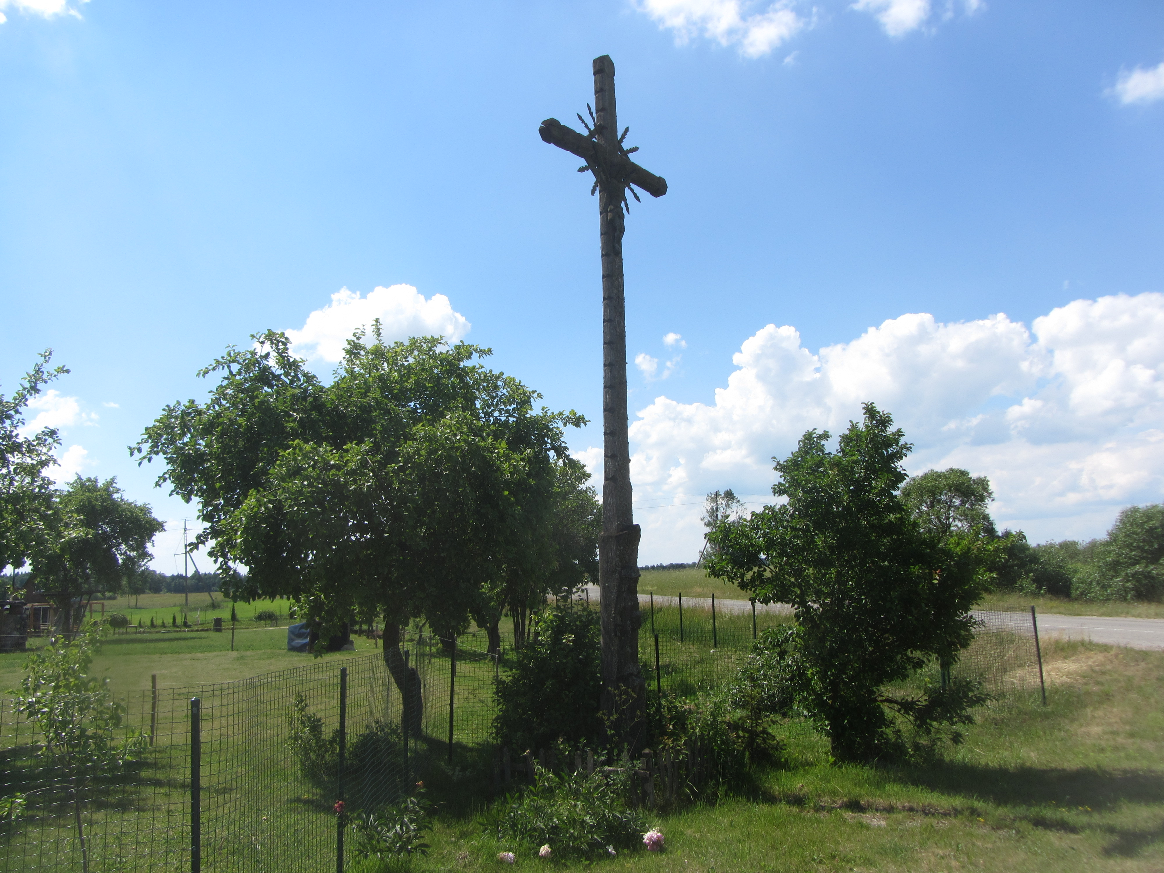 Eigirdonys 64481, Lithuania